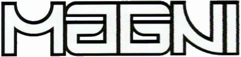 categoria:Marchi trasferibili su Commons